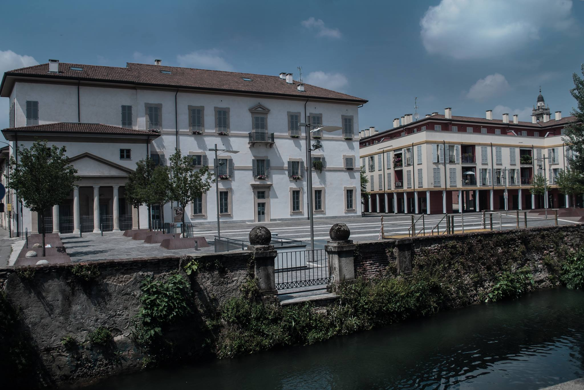 L'antichissimo Palazzo Pirola